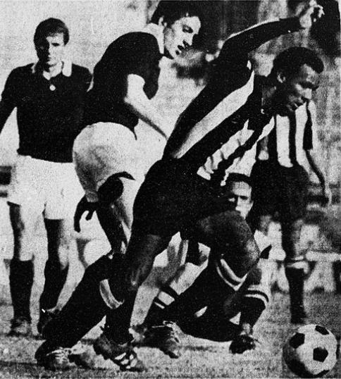 «Spencer, pericoloso centravanti del Peñarol, contrastato da Poletti», (Torino). Licensing Categoria:Immagini di Fabrizio Poletti Spencer, Alberto